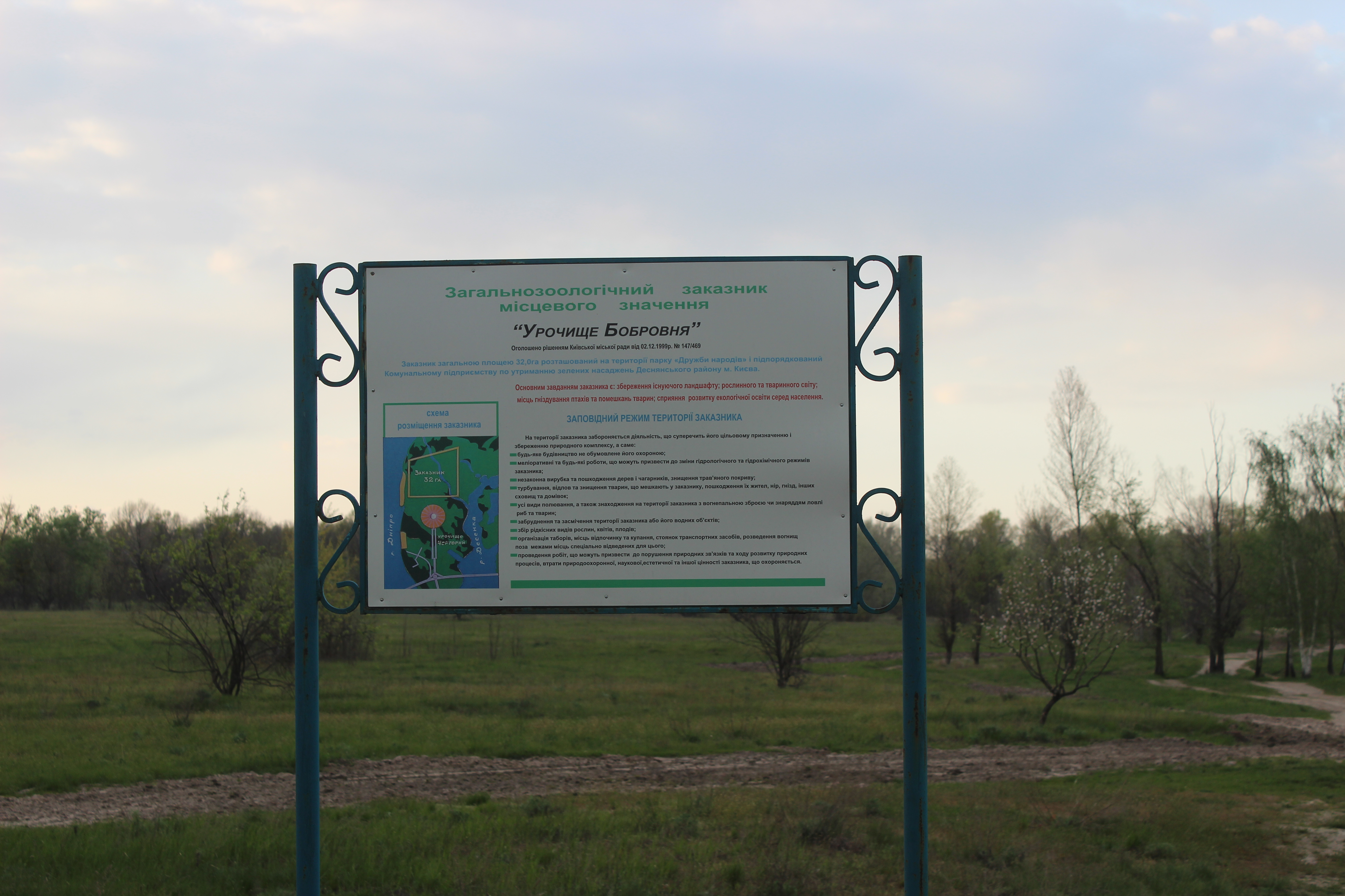 Бобровня, Деснянський район